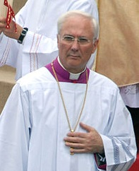 Mgr Piero Marini, maitre des célébrations liturgiques pontificales This file has been extracted from another file: BentoXVI-86-13052007.jpg